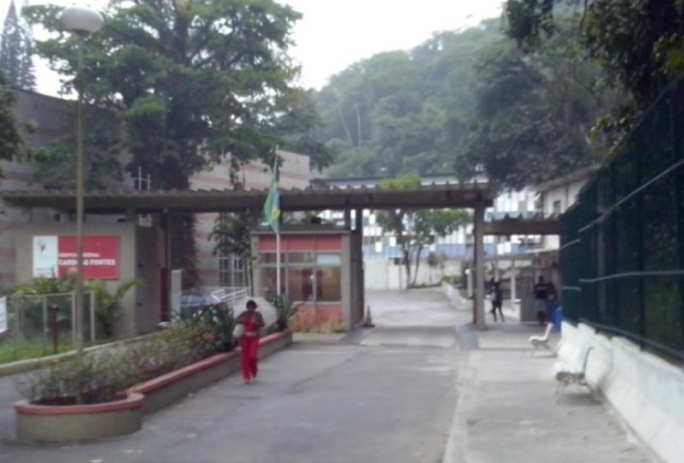 Foto de um dos principais hospitais do bairro. (Hospital Federal Cardoso Fontes)